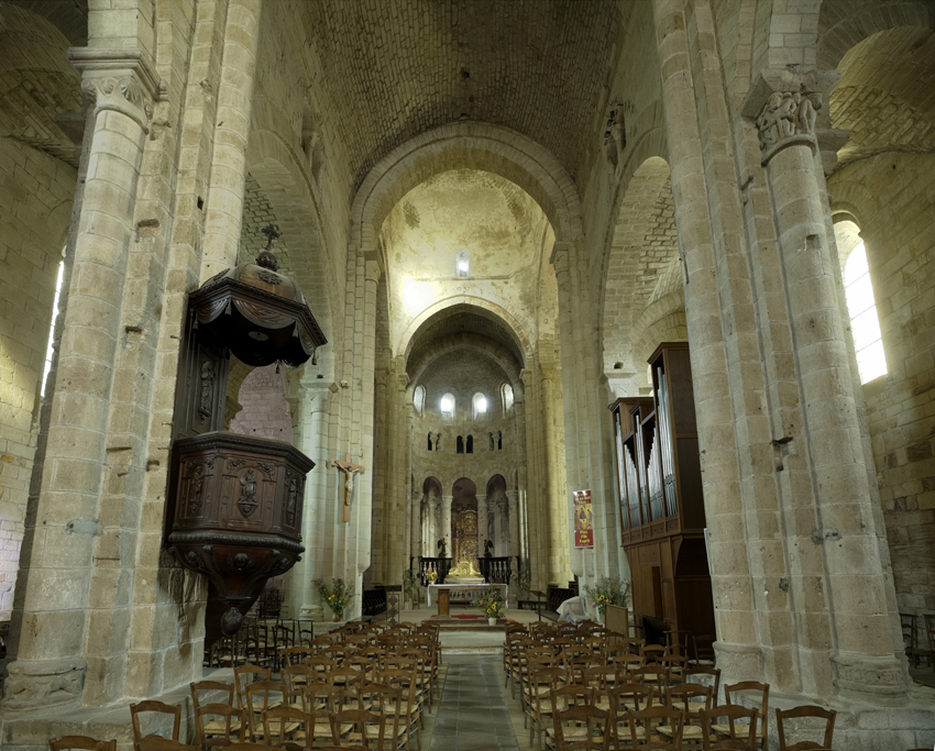 Nef de l'abbatiale Saint-Pierre de Beaulieu-sur-Dordogne (19).